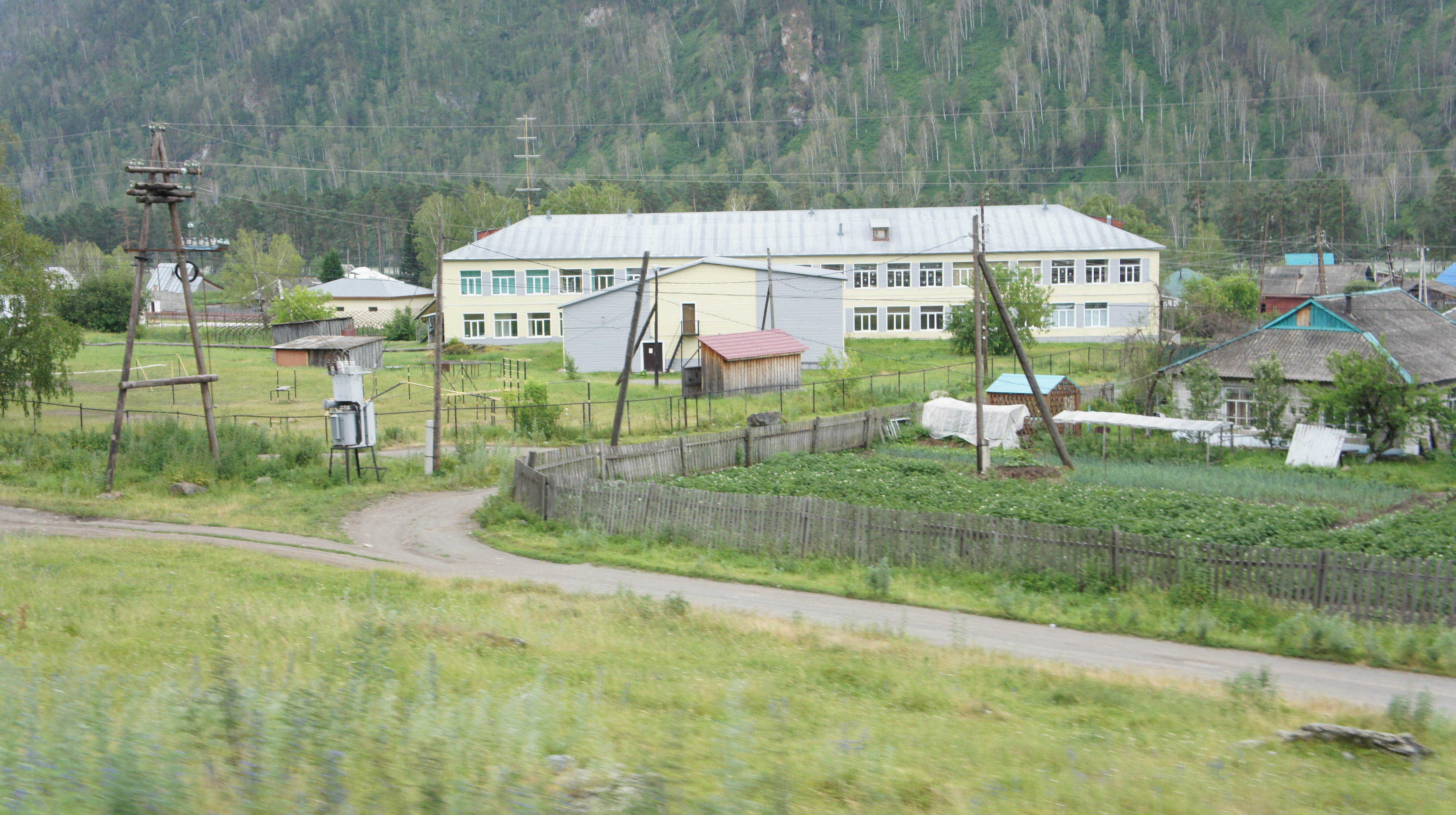 Школа в Чепоше